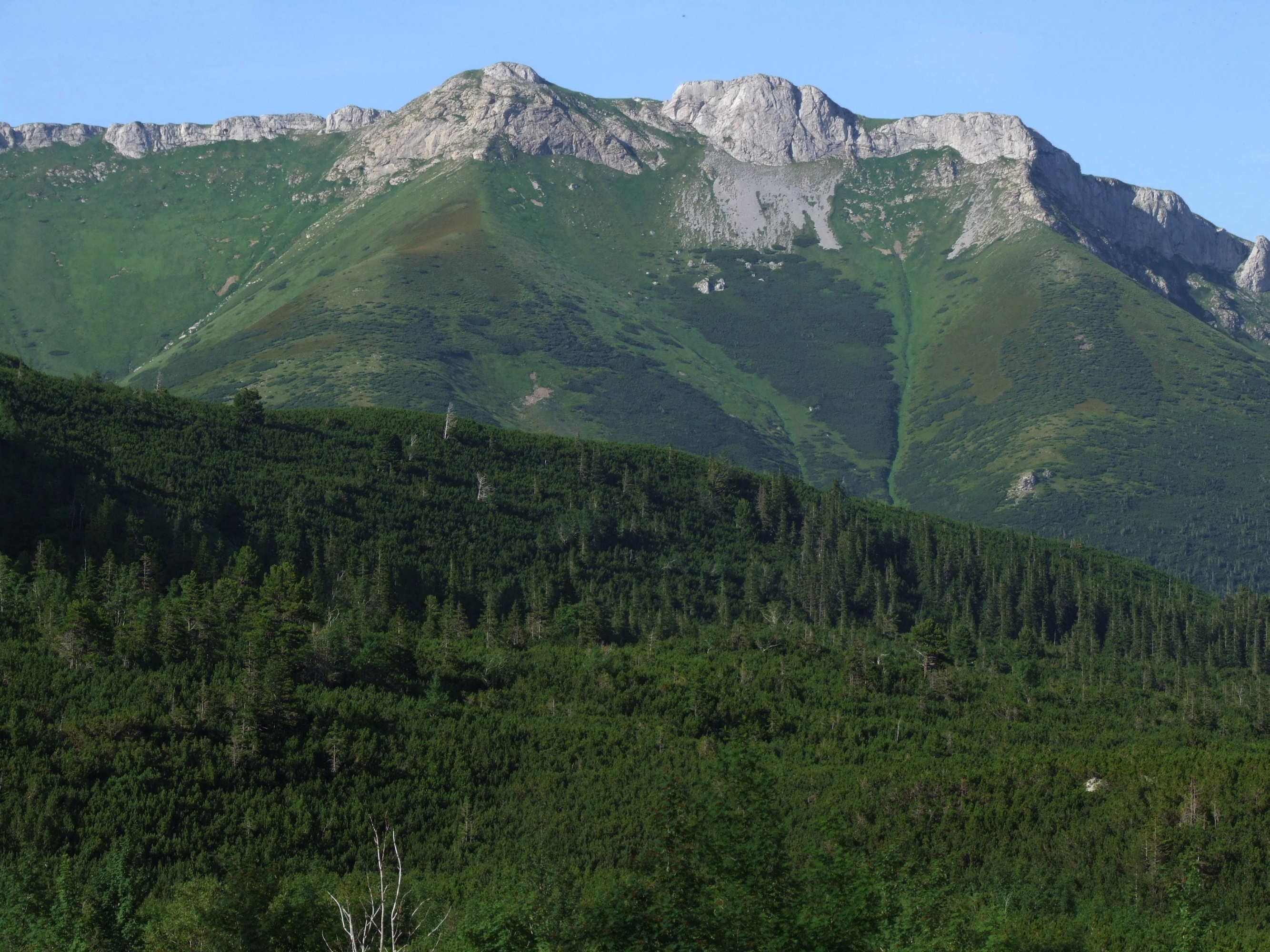 Skrajne Jatki i Golica Bielska, widok od południowej strony